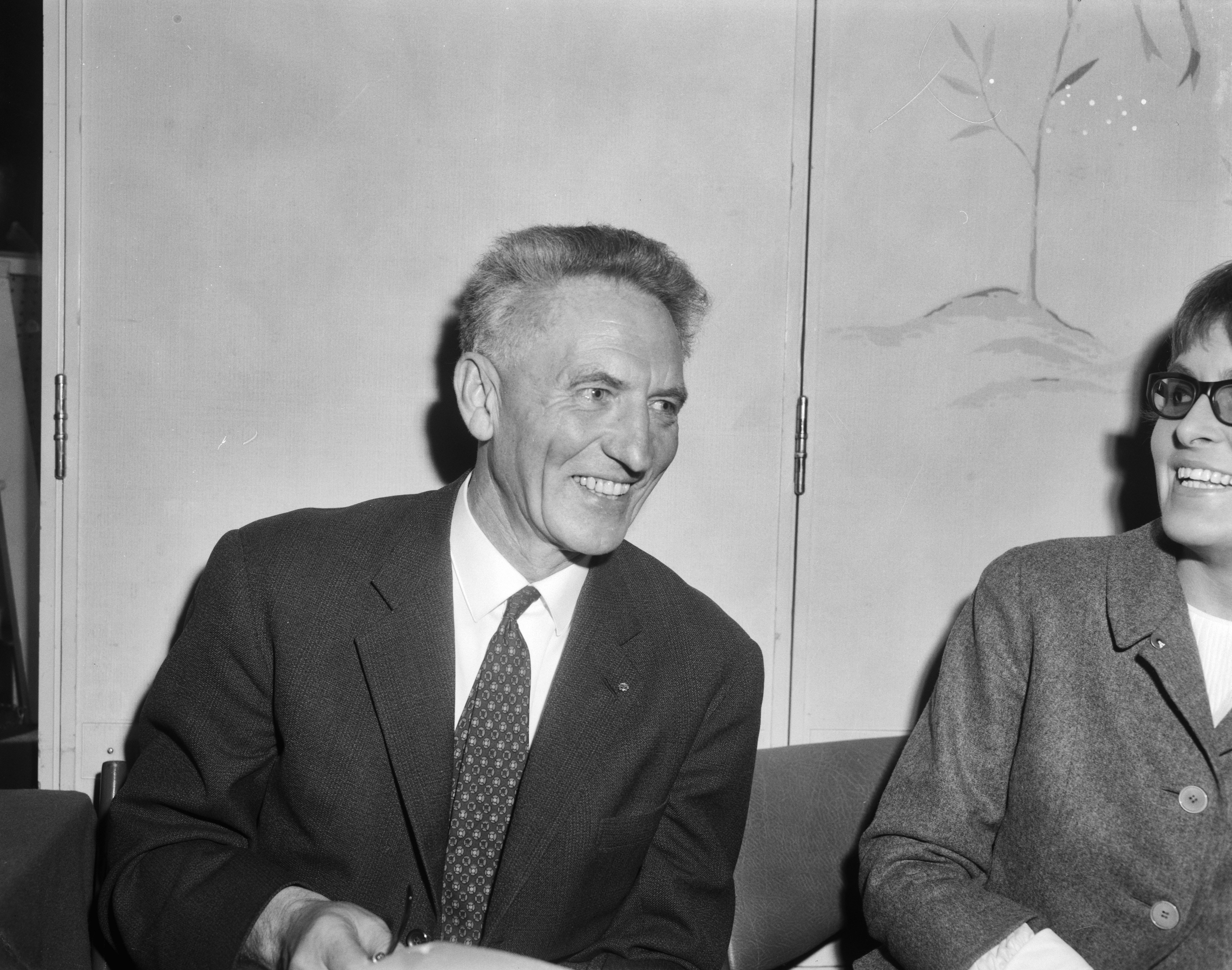 Collectie / Archief : Fotocollectie Anefo Reportage / Serie : [ onbekend ] Beschrijving : Bijeenkomst Partij van de Arbeid in Krasnaposlky, Haakon Lie (secretaris Noorse Socialistische Partij ) Datum : 4 maart 1965 Trefwoorden : bijeenkomsten, secretarissen Instellingsnaam : Krasnapolsky, PvdA Fotograaf : Bilsen, Joop van / Anefo Auteursrechthebbende : Nationaal Archief Materiaalsoort : Negatief (zwart/wit) Nummer archiefinventaris : bekijk toegang 2.24.01.04 Bestanddeelnummer : 917-4968